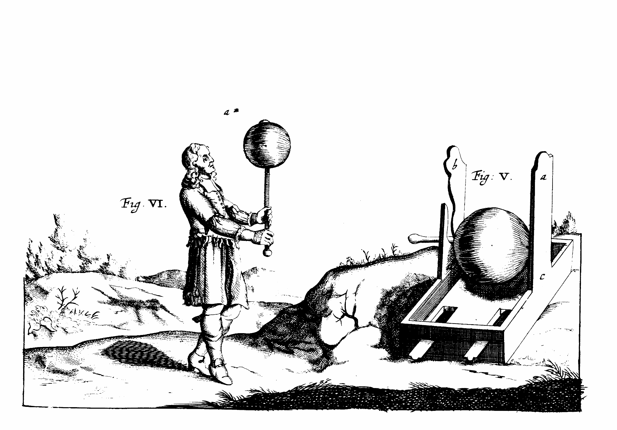 Otto von Guerickes Schwefelkugel (erste Elektrisiermaschine der Welt)